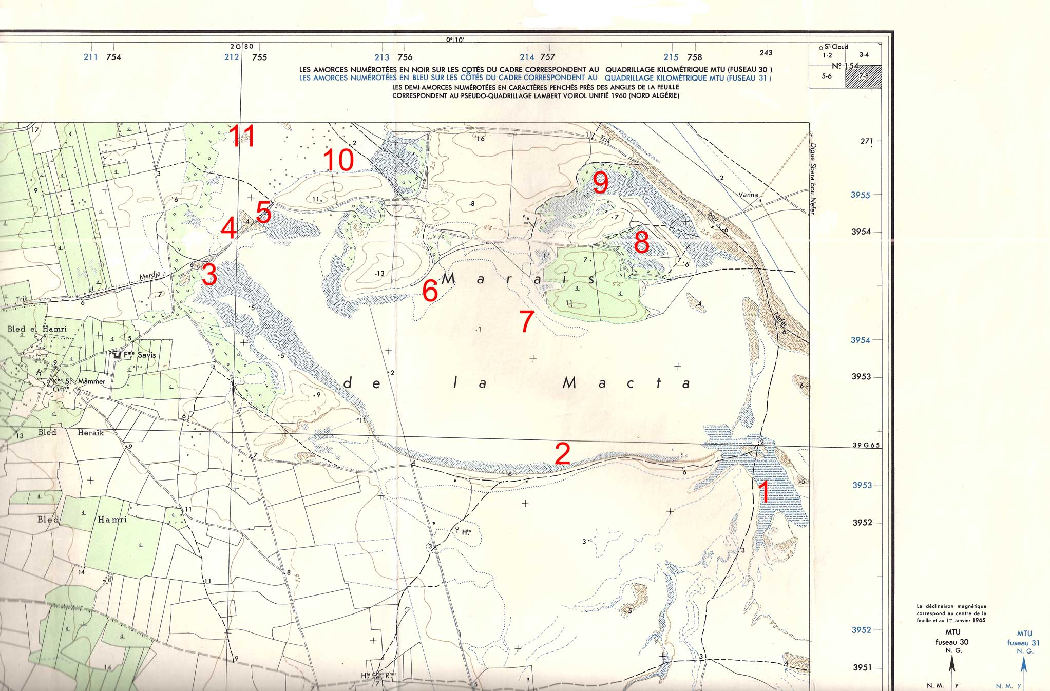 Marais de la Macta (Algérie). Extrait cartographique présentant le secteur sud des marais. En rouge : stations pour lesquelles la faune et la flore ont fait l'objet d'une étude préliminaire en 1976 par K. Krissat et K. Horr (D.E.S. réalisé à l'Institut de Biologie de l'université d'Oran). La station 8, le lac Bou-Nefer, est une dépression à salinité très importante. Par contre, au nord et à une centaine de mètres de ce lac, la station 9 est presque un plan d'eau douce. C'est aussi la station biologiquement la plus diversifiée.